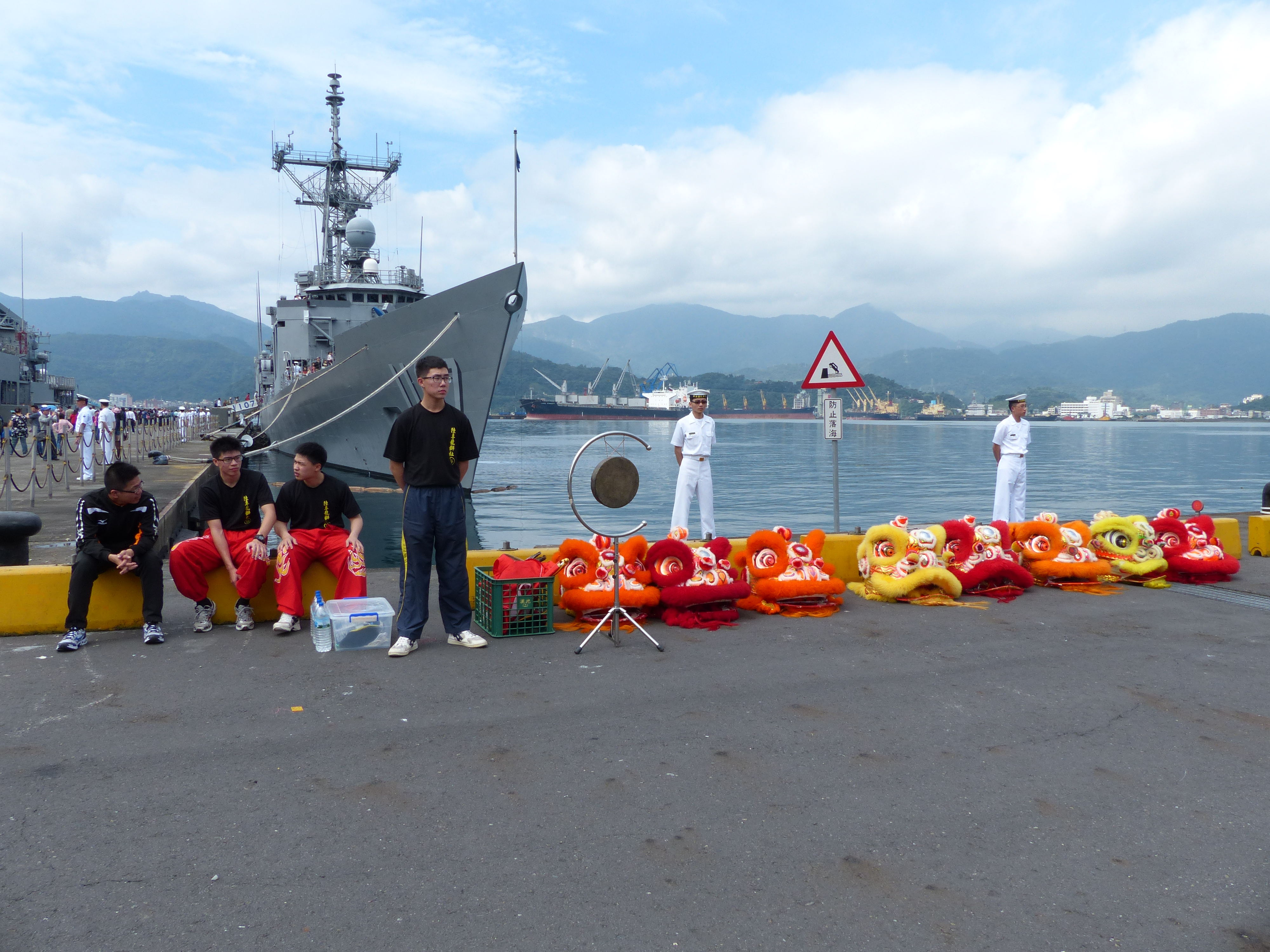 陸專龍獅社社員暖身運動中，暫置於碼頭岸邊的獅頭與銅鑼。